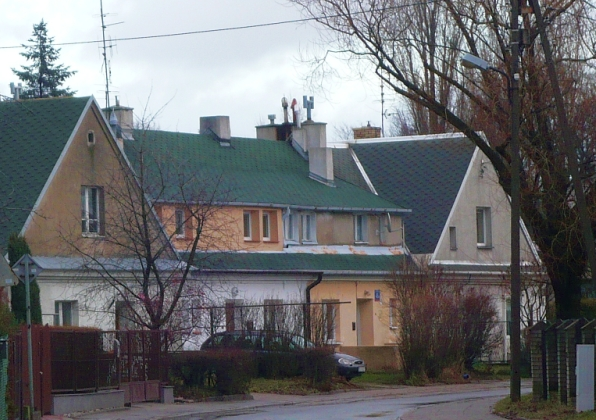 Łódź - Stoki, ulica Skalna (na wschód od Henrykowskiej). Osiedle z lat 50. XX wieku.